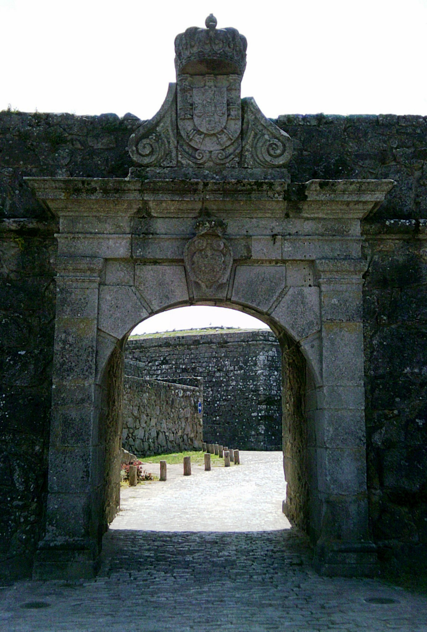 Forte de Santiago da Barra, freguesia de Monserrate, concelho e distrito de Viana do Castelo, Portugal.